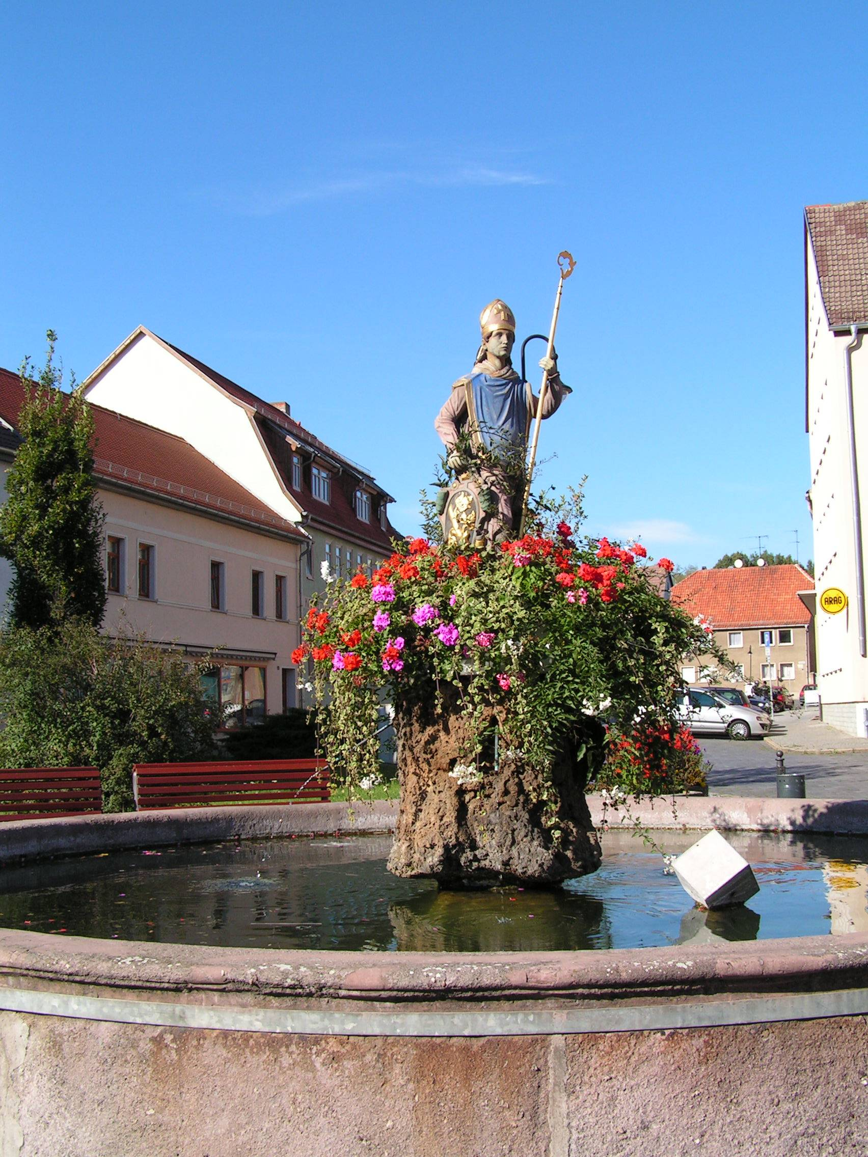 Marktbrunnen von Kölleda (Thüringen, Deutschland)